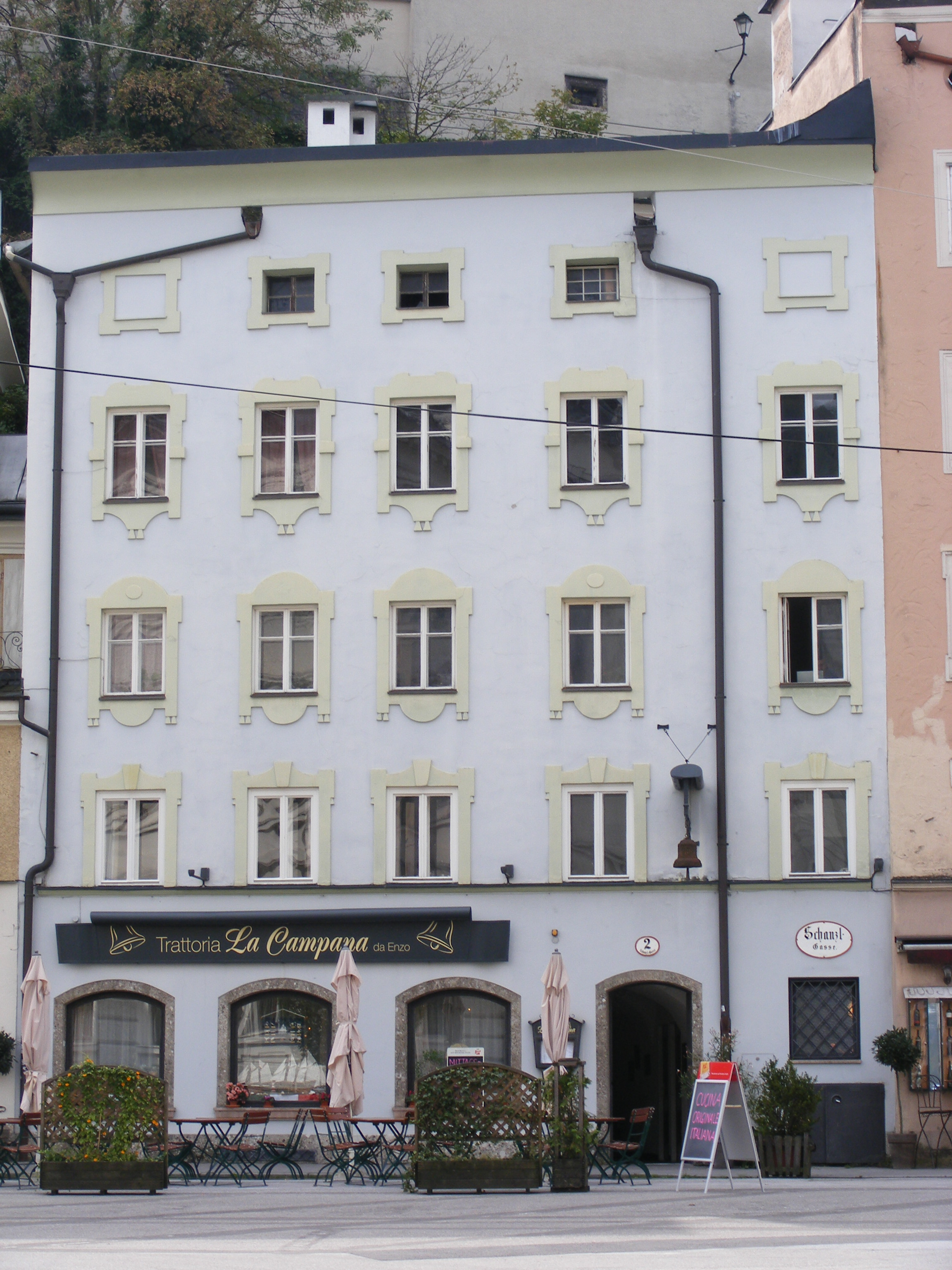 Bürgerhaus, Martinihaus (Gasthaus zur Glocke)